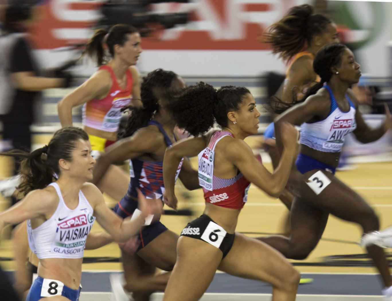 EKI20329 60m semi kambundji